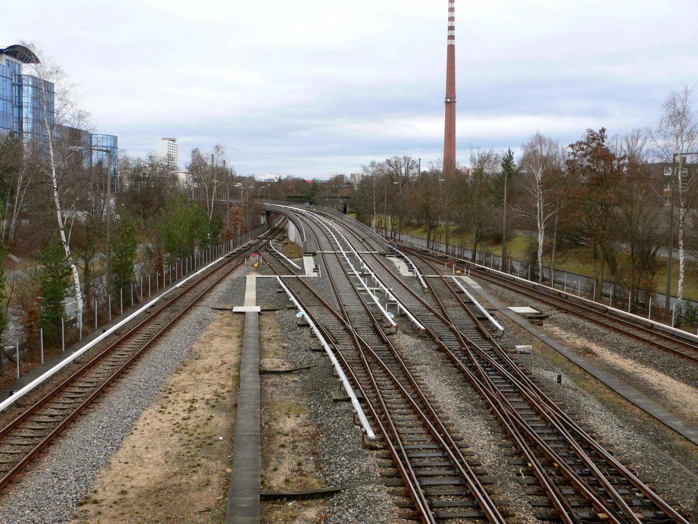 U-Bahn Nürnberg, Zufahrt zum Betriebshof am Bahnhof Scharfreiterring